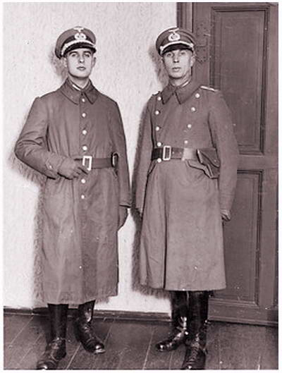 Diederik van Lynden (links)